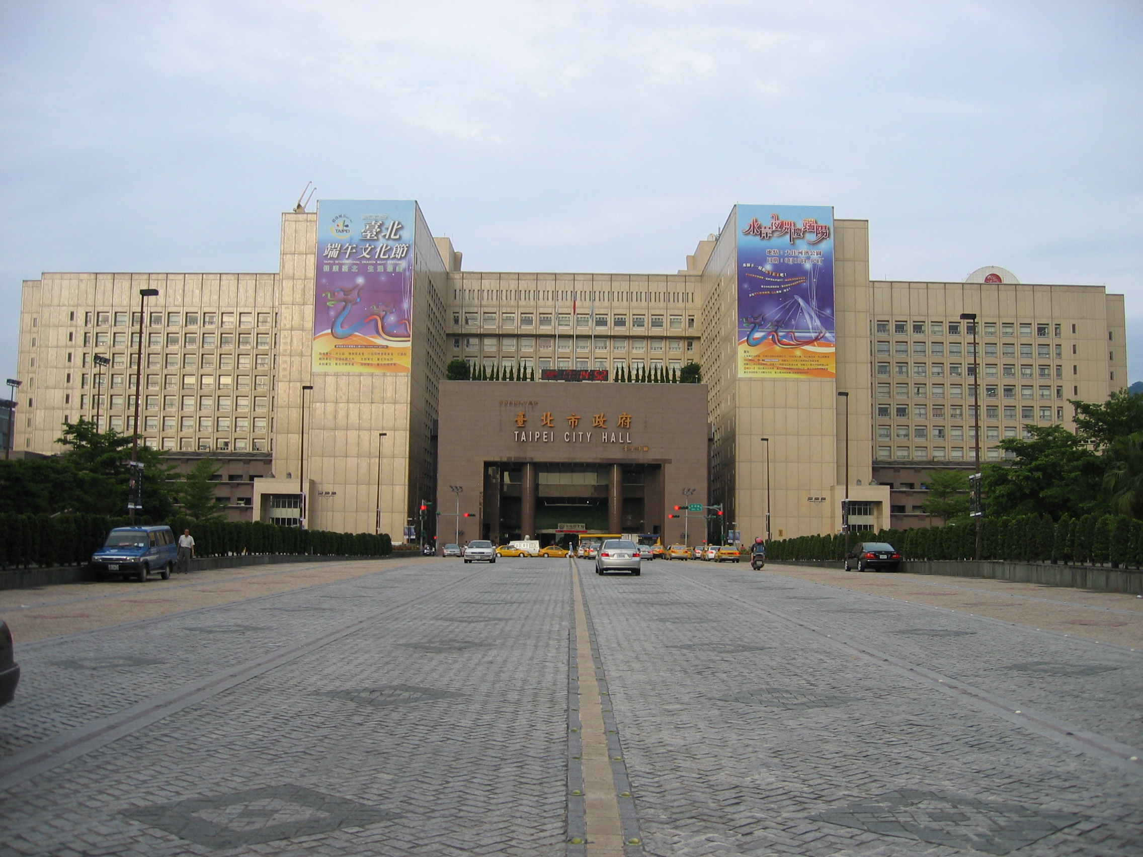 臺北市市政大樓正面。